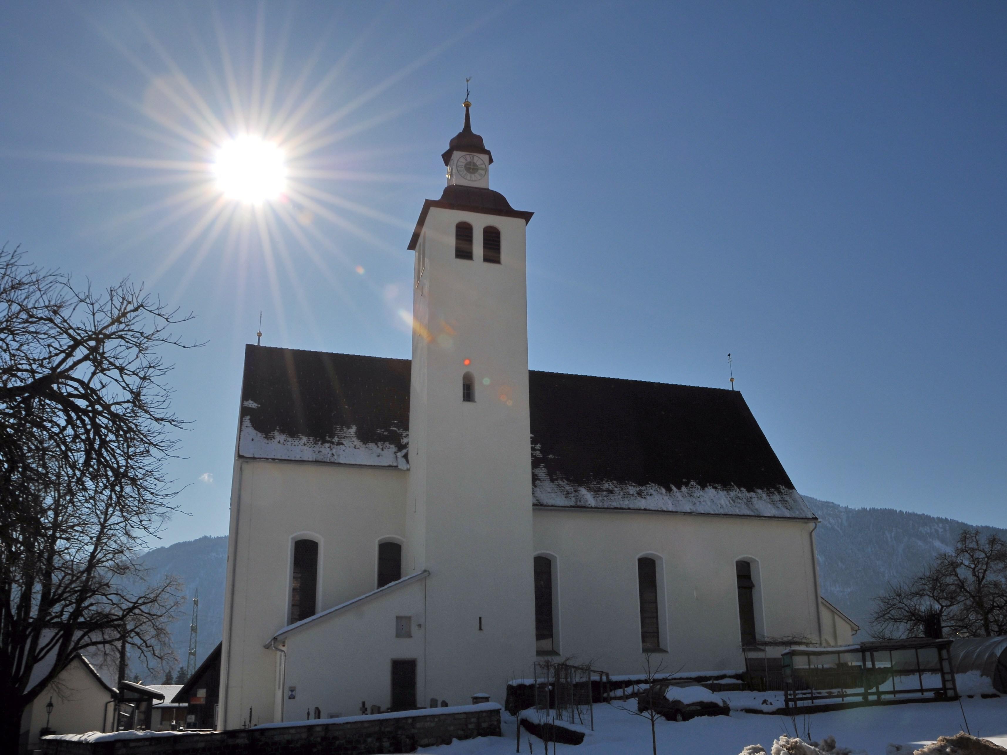 Kath. Pfarrkirche hl. Jakobus d. Ä. und Friedhof an der Alten Landstraße in Bludesch.